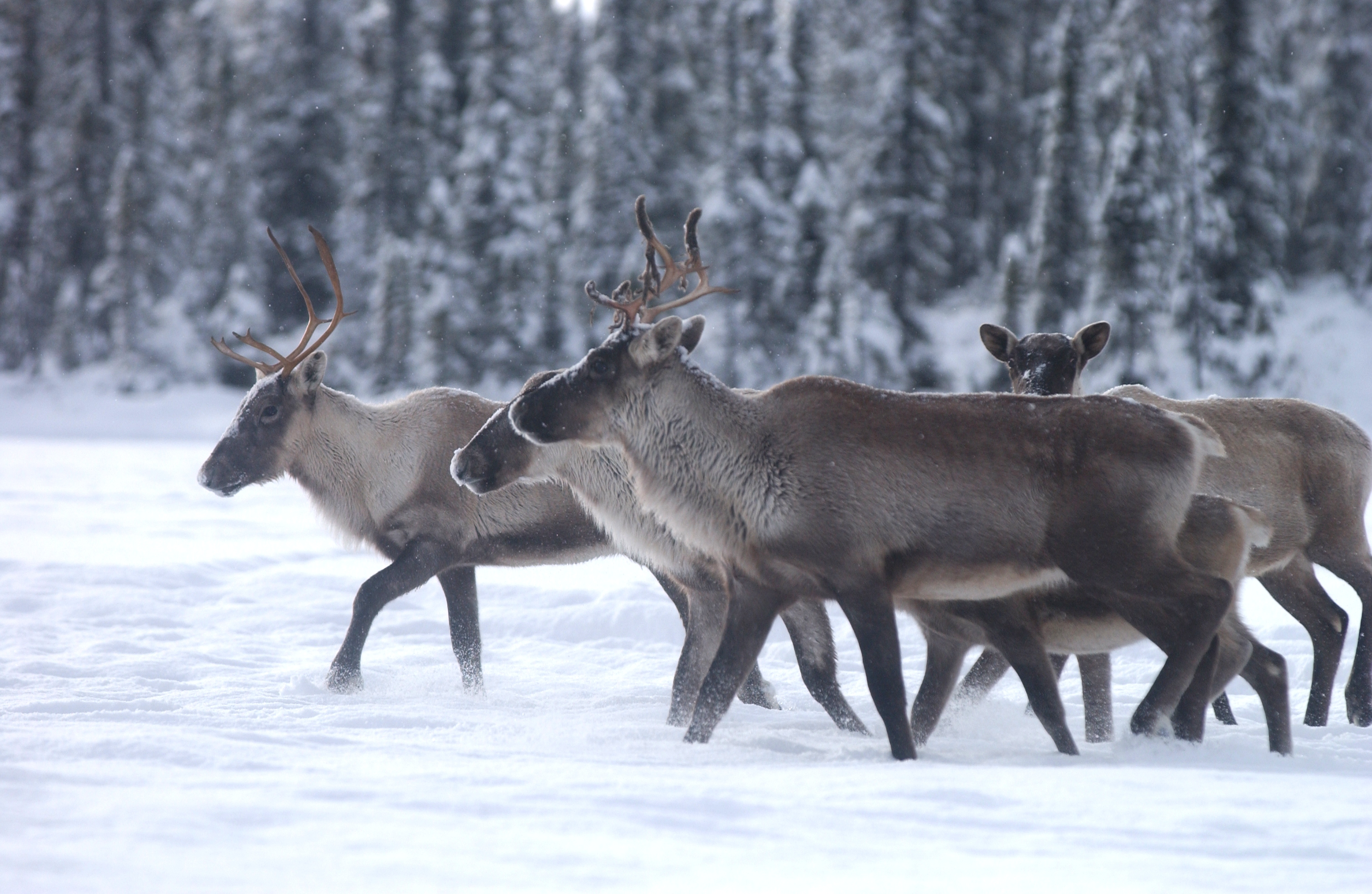 Une petite partie des caribous qui passent dans la région à ce moment là.